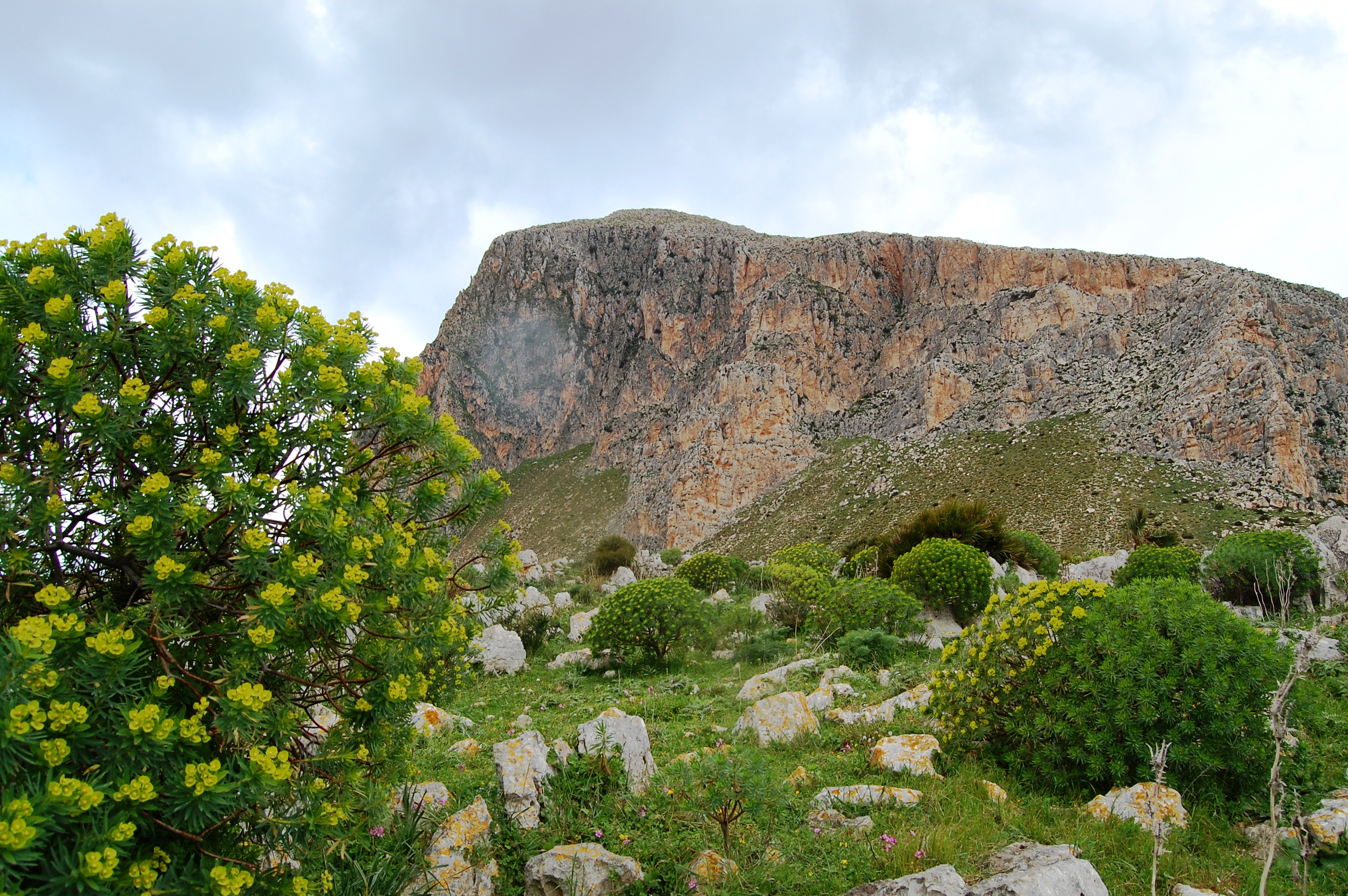 Riserva naturale Monte Cofano, Sicily